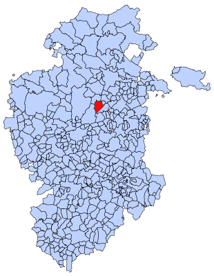 Rublacedo de Abajo en Burgos